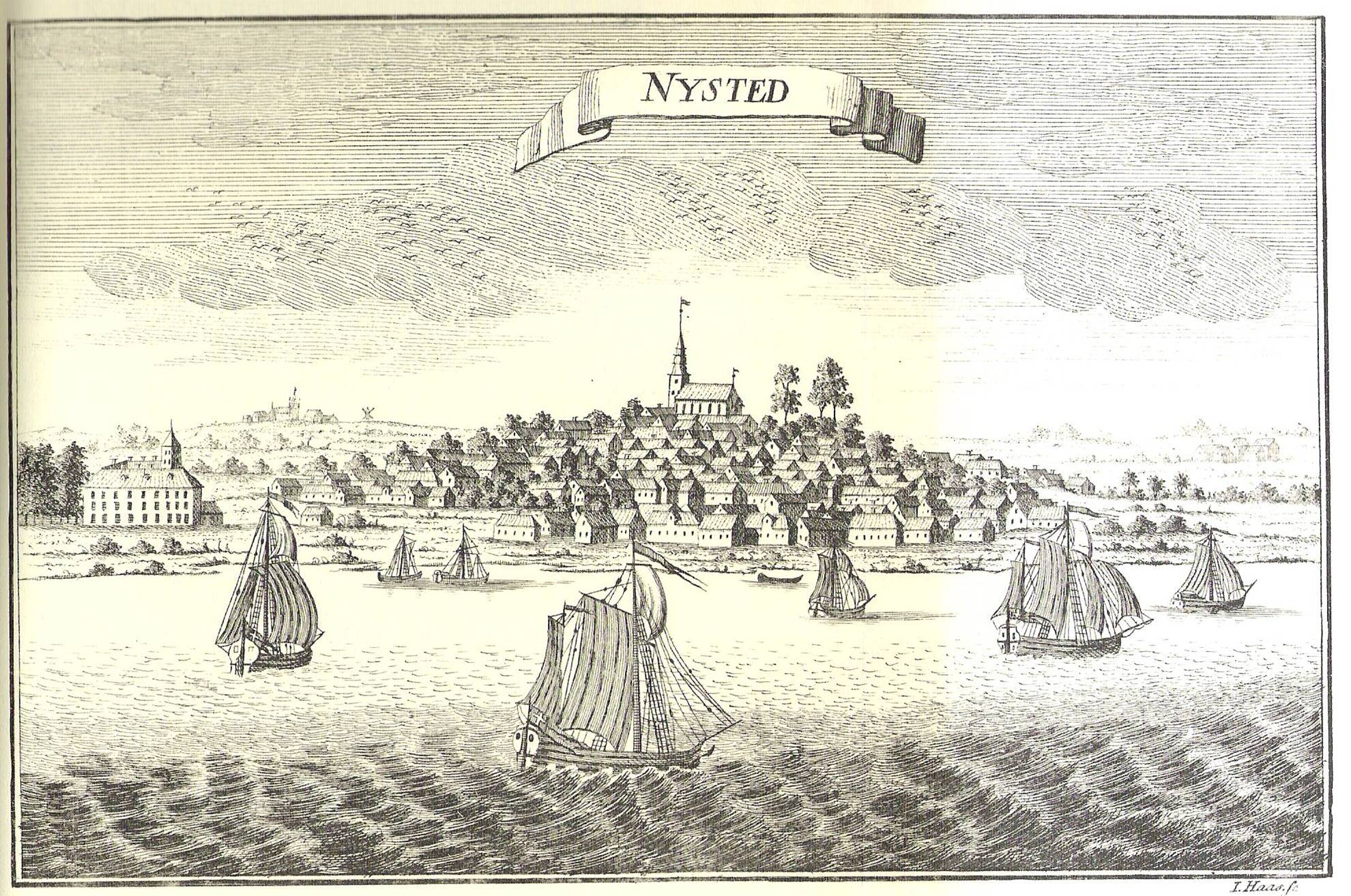 Prospekt fra Erik ´Pontoppidans Danske Atlas fra 1767. Det meste er fri fantasi. Ålholm til venstre og kirken er troværdige. Landskabet og byens placering i det noget overdrevet, skønt Nysted ligger på en skrænt ved Nysted Nor. Nysted, Denmark 1767